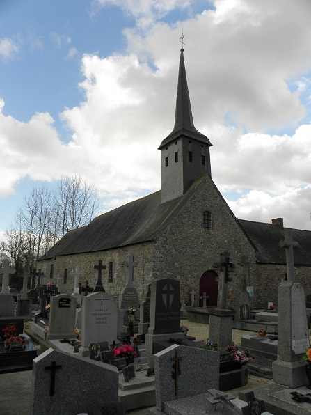 Église Saint-Léger de Saint-Léger-des-Prés (35).